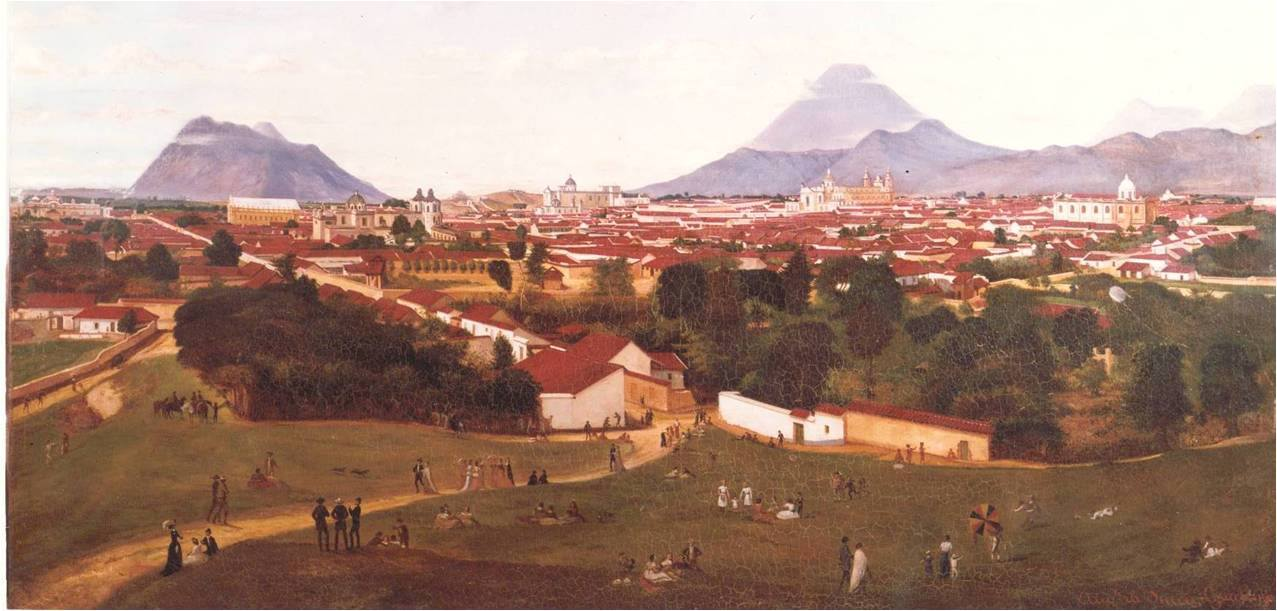 Pintura de la Ciudad de Guatemala en 1870.